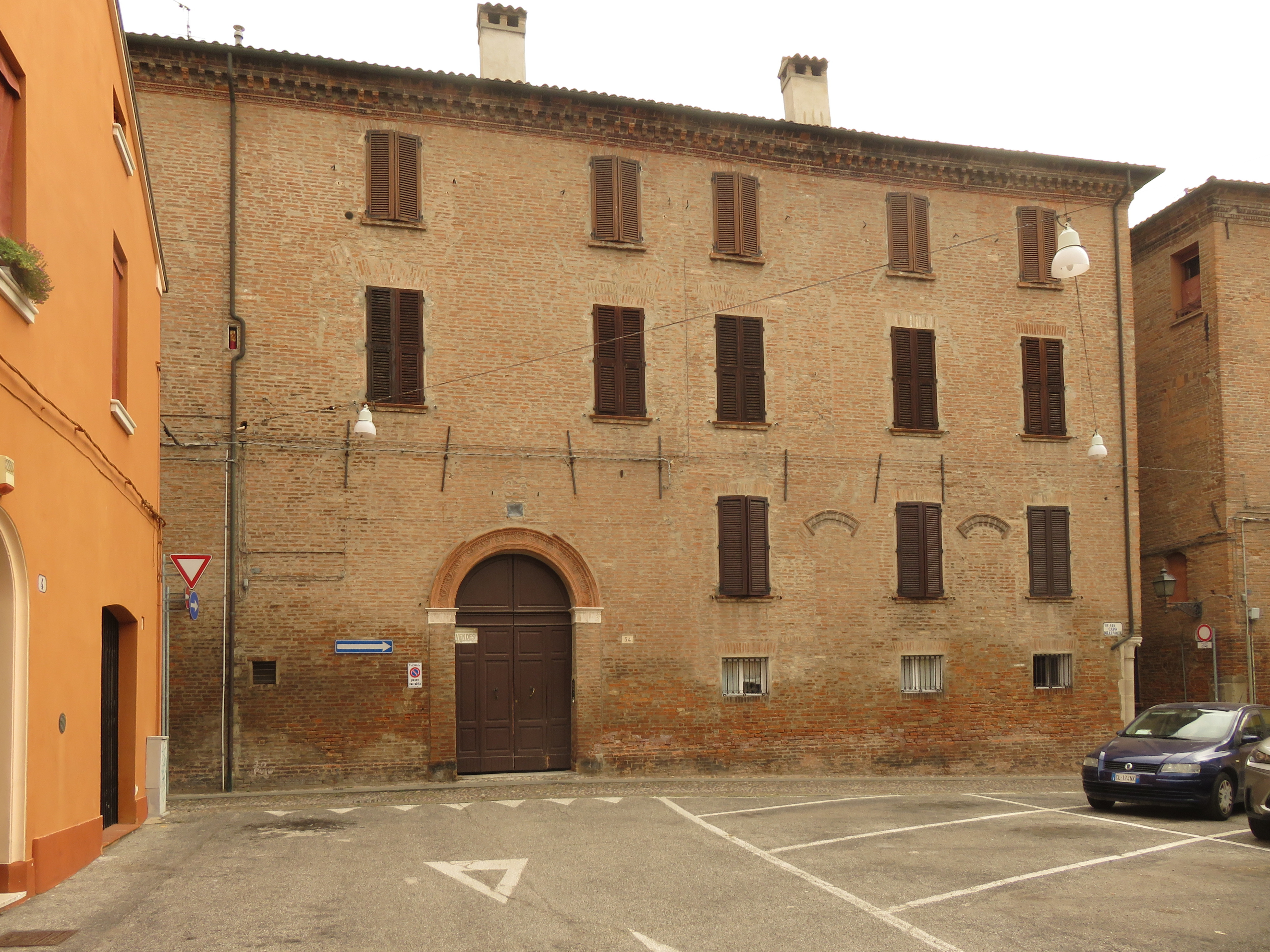 Via Capo delle Volte, a Ferrara. Particolare.